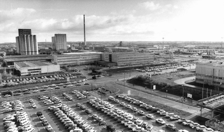 Schwerin, Industriegebiet Süd ADN-ZB Pätzold-11.11.1986 Schwerin: 10 Jahre Industrie-Agrar Bezirk Der VIII. Parteitag der SED beschloß 1971 den Aufbau des Industriekomplexes im Süden Schwerins. Planer und Bauleute schufen an einem Standort, der die Lebensqualität in der Stadt der Seen und Wälder nicht beeinträchtigt. Plastmaschinen-, Lederwaren- und Hydraulikwerk mit rund 10000 Arbeitsplätzen. -siehe auch 24 und 25N sowie dazu die Bezirkskorrespondenz